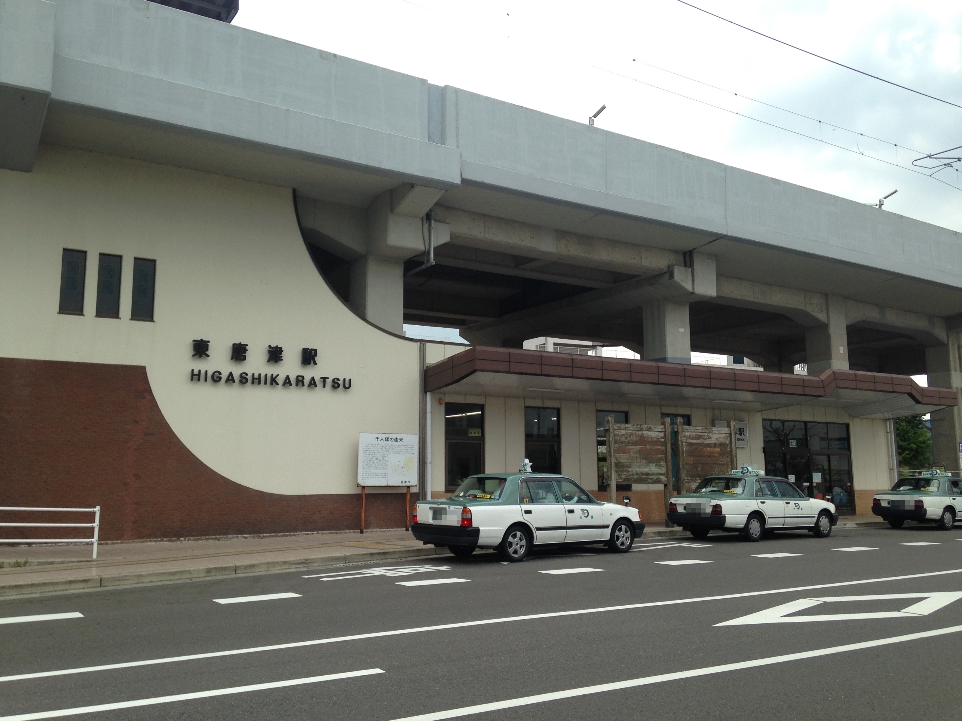 東唐津駅北口